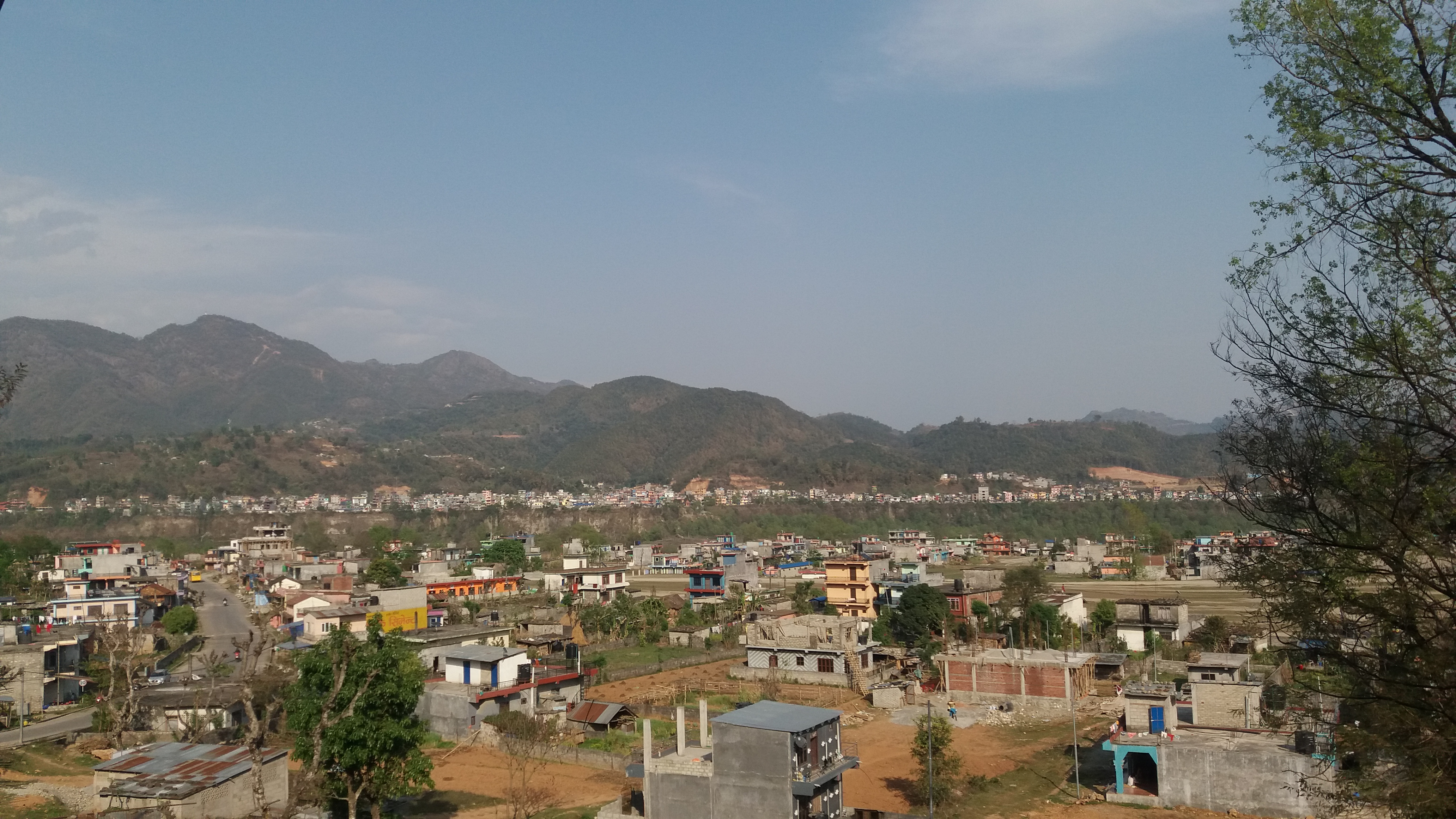 नेपाली: सुक्ला गण्डकी परिसरको एक दृश्य